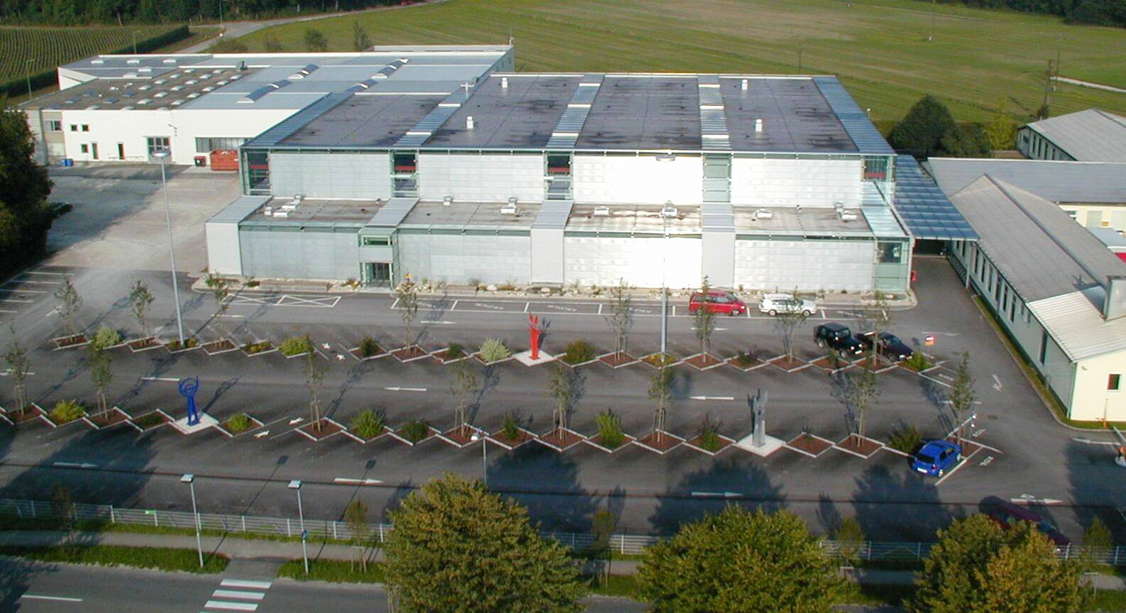 STIWA Group Werk in Attnang-Puchheim